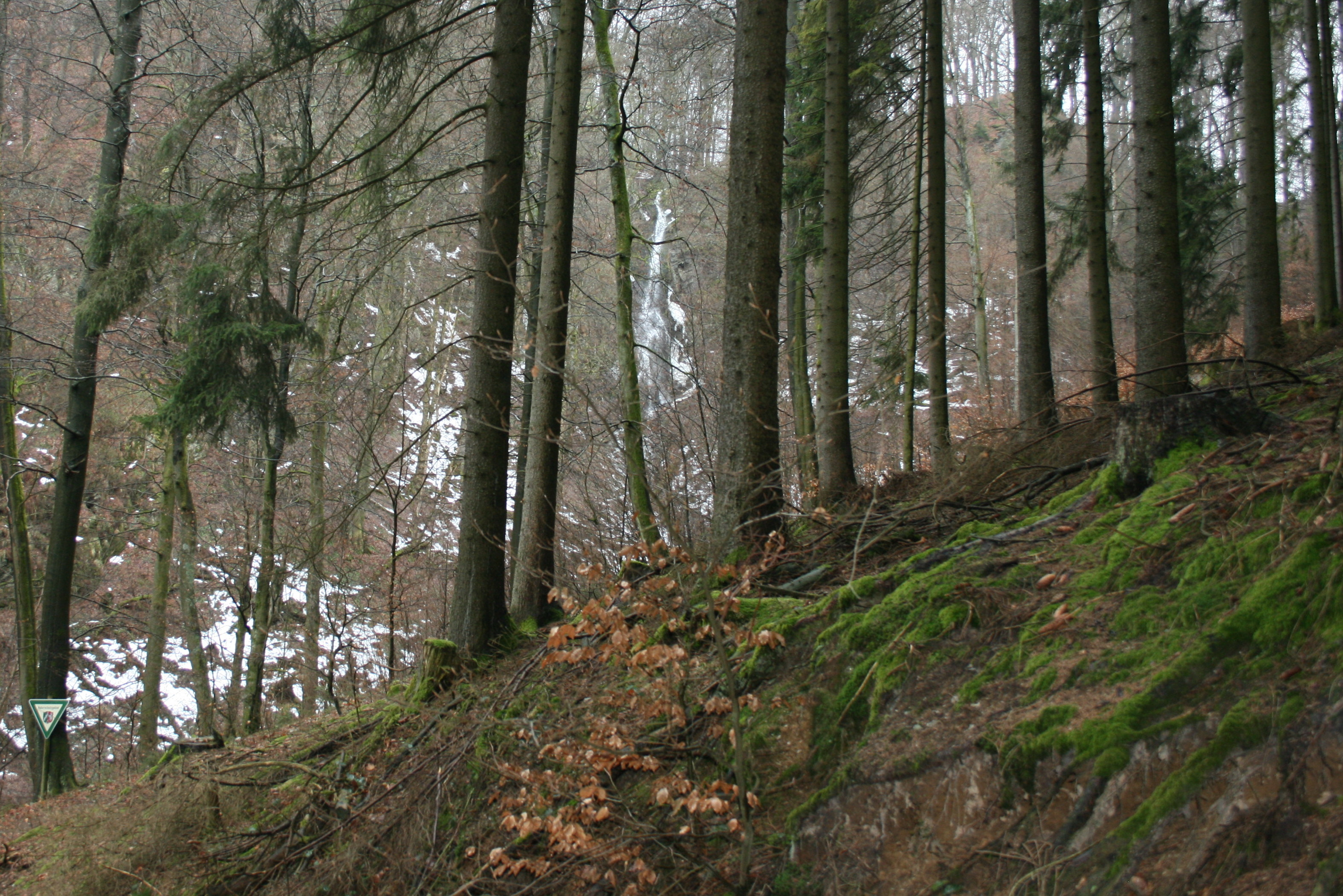 Das Bild zeigt die steilen Hänge des Naturschutzgebietes Plästerlegge - Auf'm Kipp in Bestwig. Im Hintergrund ist der 20 Meter hohe Wasserfall zu sehen.